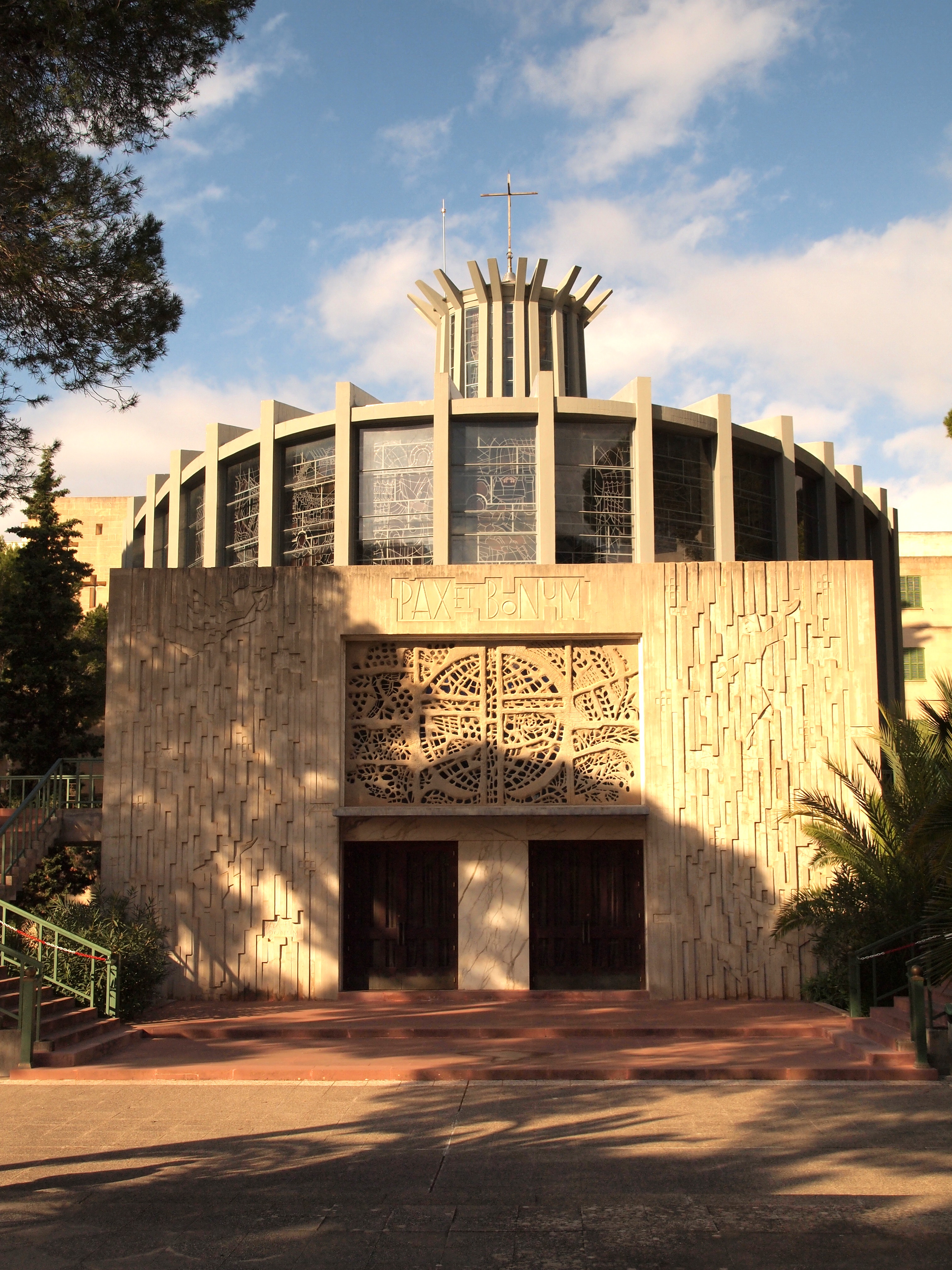 Església de Nostra Senyora dels Àngels de la Porciúncula, a Palma (Mallorca). Façana principal